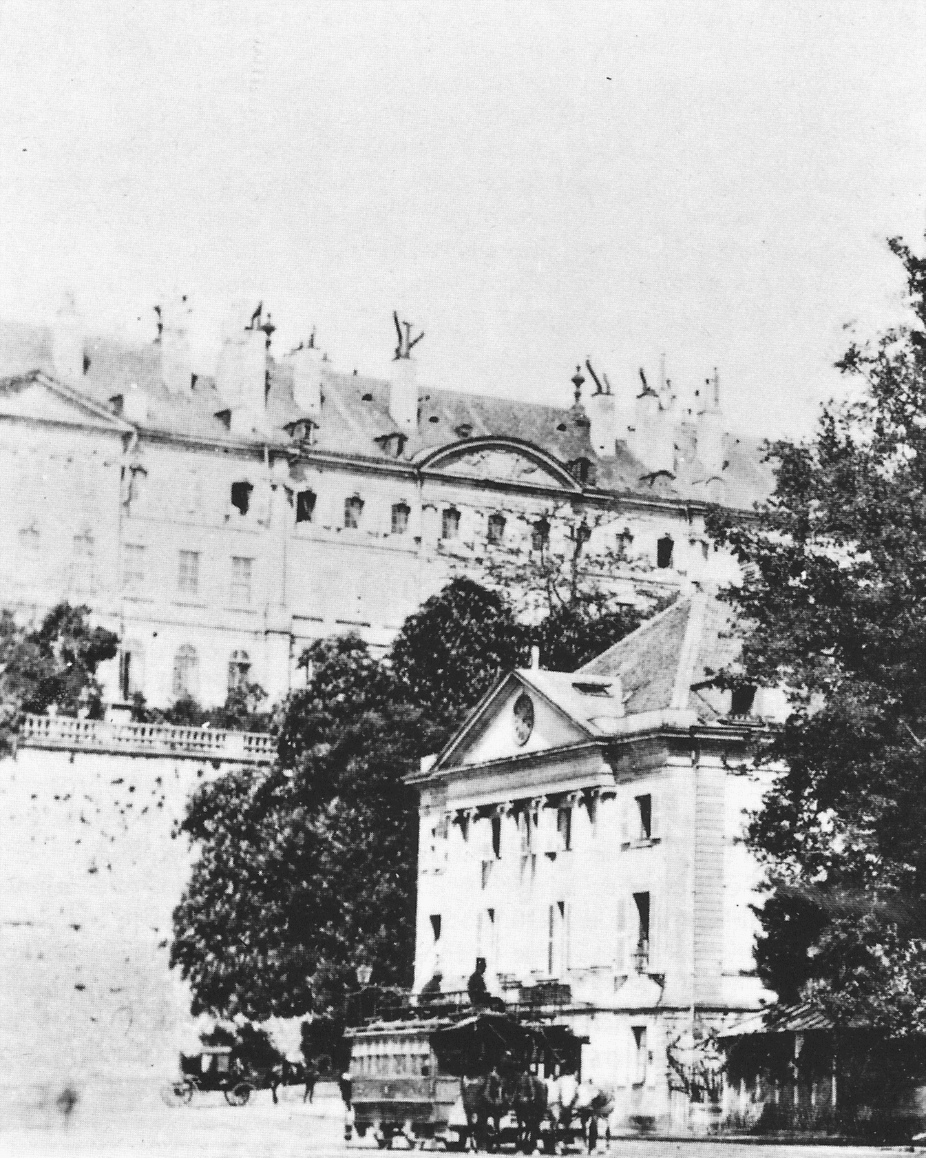 Deux voitures à impériales devant le théâtre de la Place Neuve en 1862